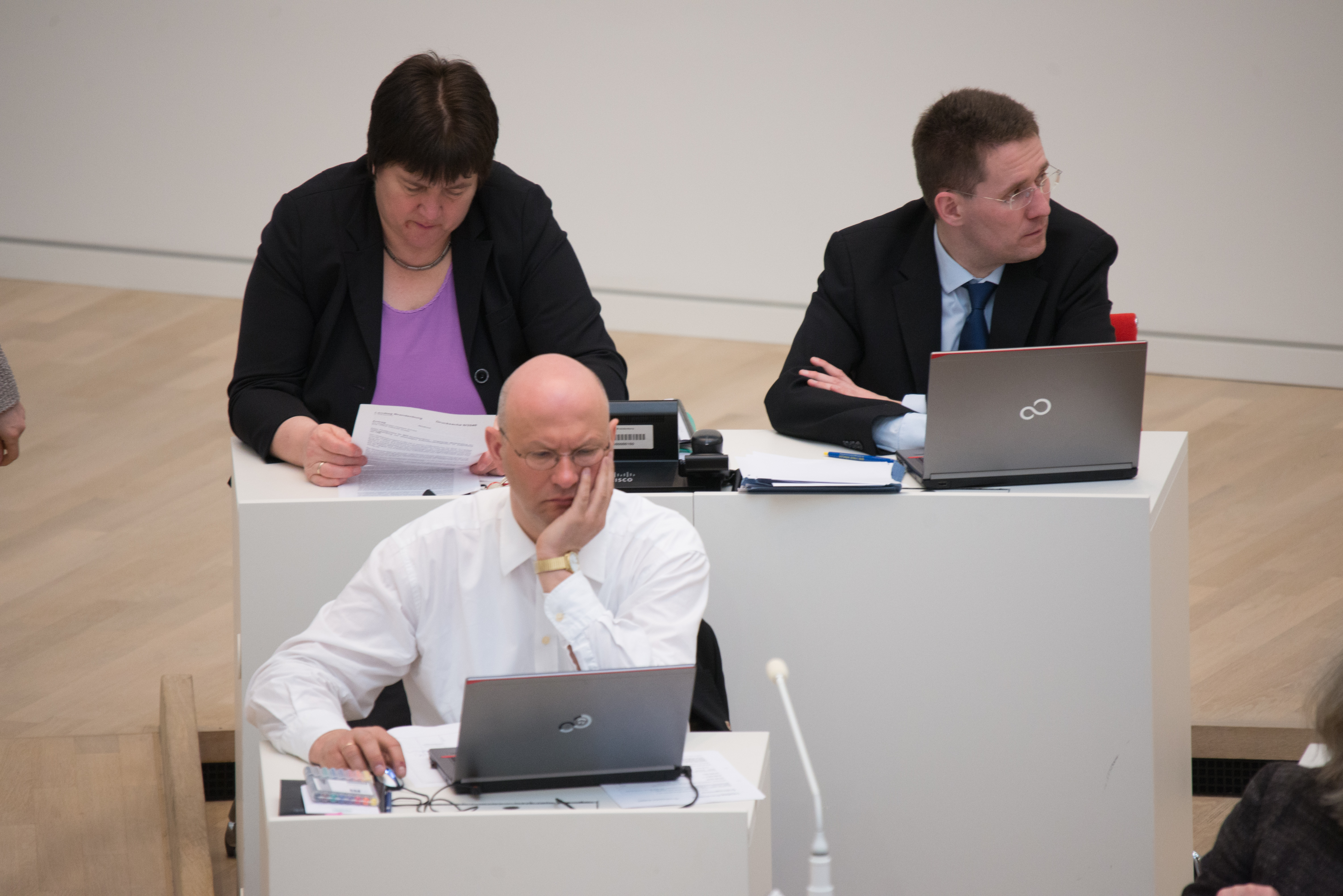 Impressionen aus der Plenarsitzung vom 9. März 2016 des Landtages Brandenburg